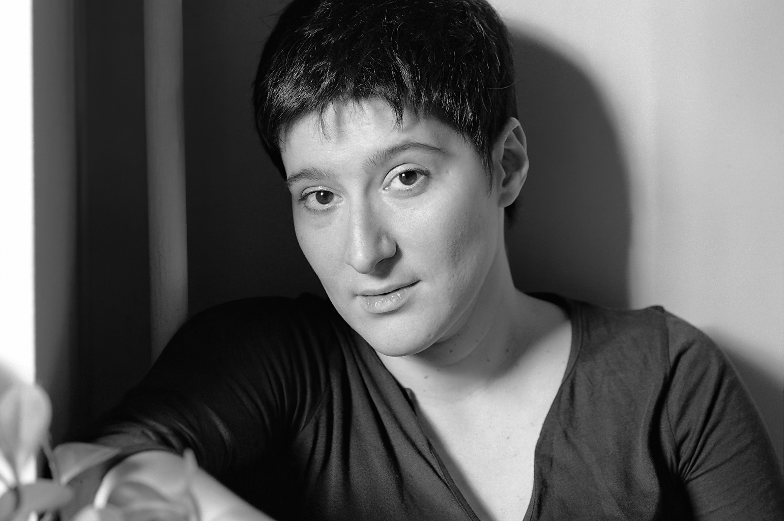 Фотография для телепрограммы